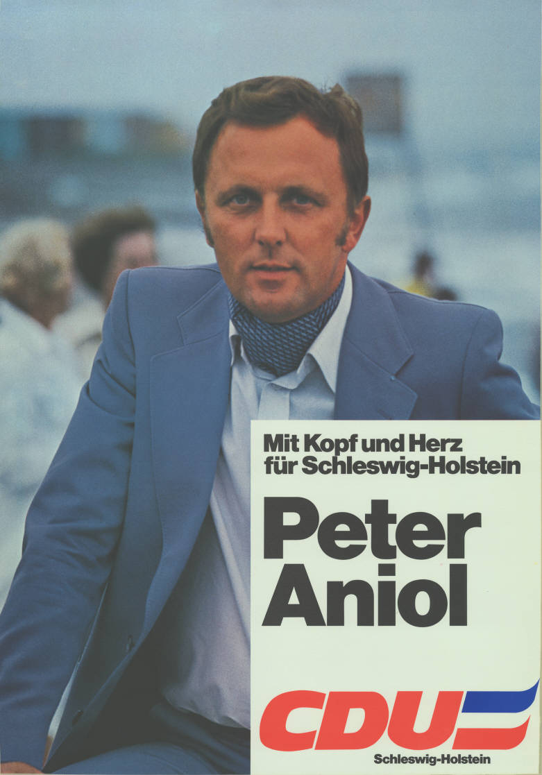 Mit Kopf und Herz für Schleswig-Holstein Peter Aniol CDU Schleswig-Holstein Abbildung: Foto Plakatart: Kandidaten-/Personenplakat mit Porträt Auftraggeber: Verantw.: CDU Schleswig-Holstein Objekt-Signatur: 10-012 : 418 Bestand: Landtagswahlplakate Schleswig-Holstein (10-012) GliederungBestand10-18: Landtagswahlplakate Schleswig-Holstein (10-012) » Landtagswahl am 29.4.1979 » Kandidatenplakate Lizenz: KAS/ACDP 10-012 : 418 CC-BY-SA 3.0 DE